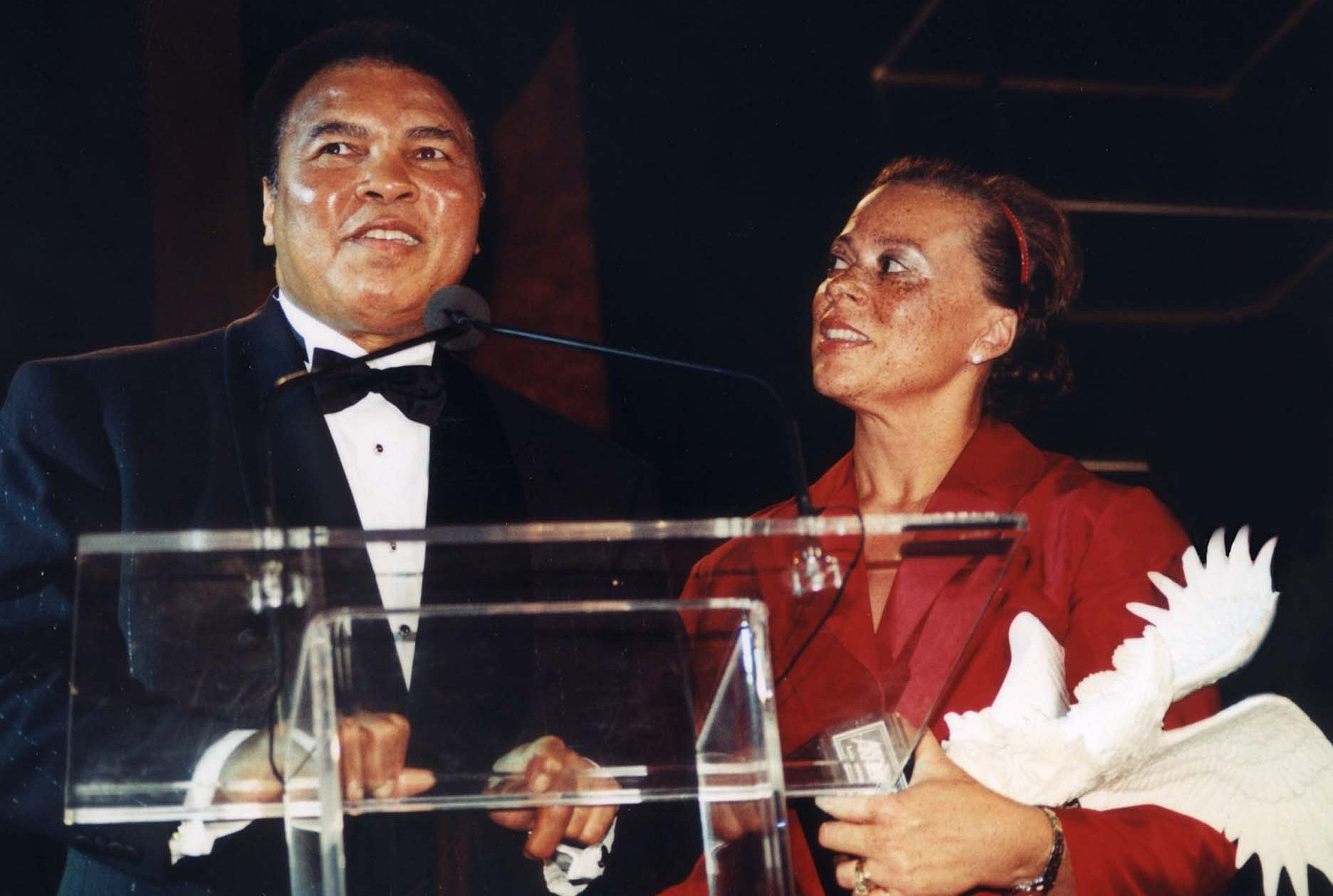 MUHAMMAD ALI AND WIFE LONNIE.WASHINGTON, DC.JUNE 11, 2001